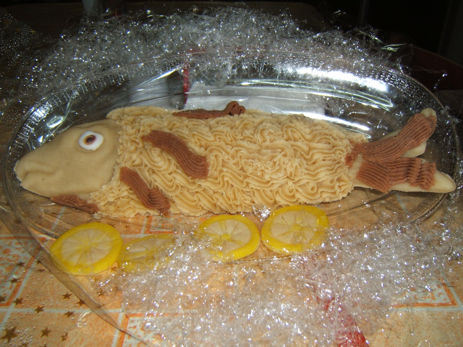 Pesce di pasta di mandorle, tipico dolce natalizio salentino, realizzato in una pasticceria salentina